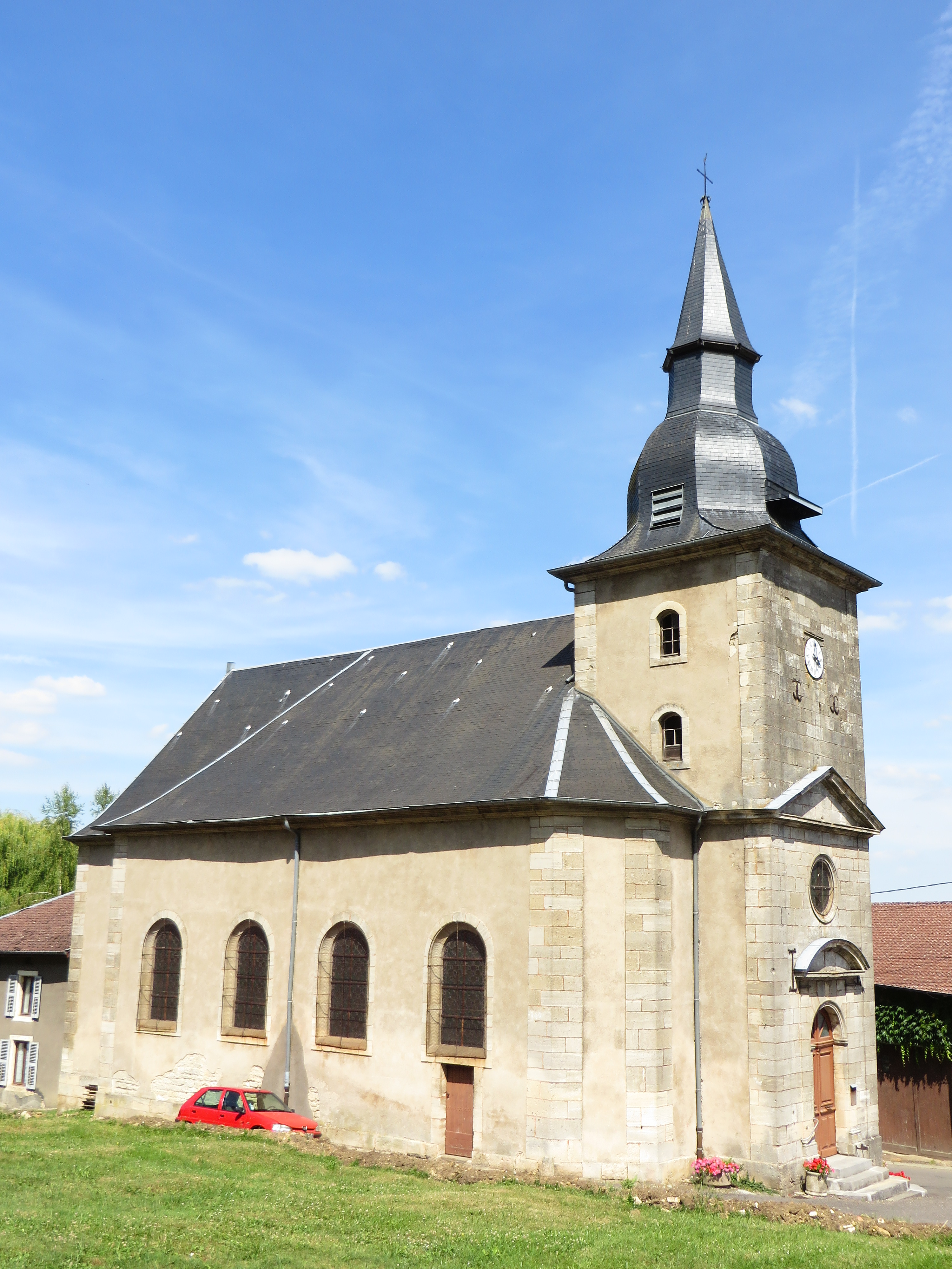 Lissey Église Saint-Rémy